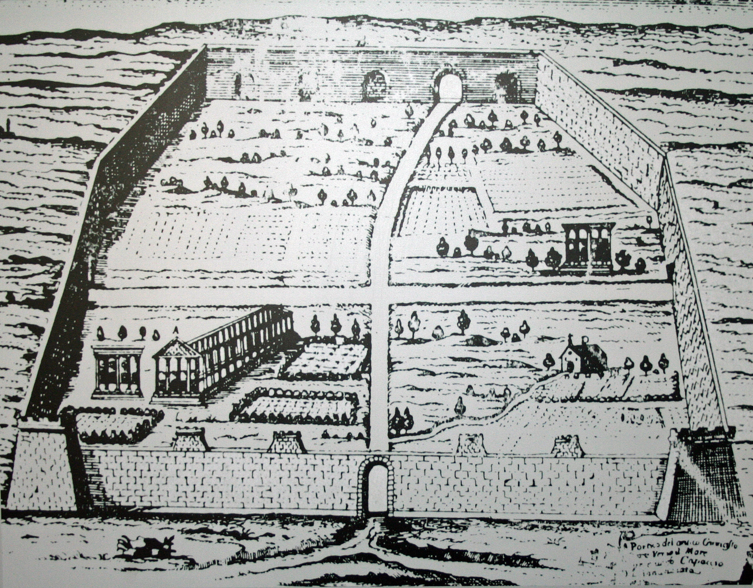 Pianta di Paestum, di Costantino Gatta, 1732. L'immagine - che è la più antica pianta attualmente nota che ritrae tutta l'area archeologica di Paestum - è stata realizzata prima dell'apertura da parte di Carlo III di Borbone della Strada delle Calabrie (oggi SS 18) che attraversa la città antica in senso N-S. L'immagine è orientata E-W, e pur rappresentando tutti gli elementi più caratteristici e distintivi di Paestum, tuttavia appare molto imprecisa ed approssimativa: la città è compressa da tutti i lati, con la parte orientale talmente ridotta che i due templi maggiori, correttamente posti in prossimità di Porta Giustizia (a sinistra) si ritrovano al tempo stesso a poca distanza da Porta Sirena (in basso) da cui invece sono molto distanti. Il Tempio di Cerere correttamente situato presso Porta Aurea (a destra) risulta però lontano e sfalsato rispetto agli altri due templi, che invece nella realtà si trovano sulla stessa linea. La chiesa proto-romanica dell’Annunziata correttamente collocata ad E del Tempio di Cerere, mostra prima di tutto un orientamento sbagliato e poi un allineamento con gli altri due templi che è irreale. Molto lontani dalla realtà, infine, sono l'altezza e la sottigliezza delle mura, le torri (ridotte a due soltanto) con una forma medievale a scarpata e provviste di merlature, ed infine verso W (in alto) le numerose posterule che si affiancano a Porta Marina, ingrandite fino ad avere la stessa altezza della porta della città, quest'ultima fra l'altro resa con un arco integro mentre nella realtà essa è crollata.